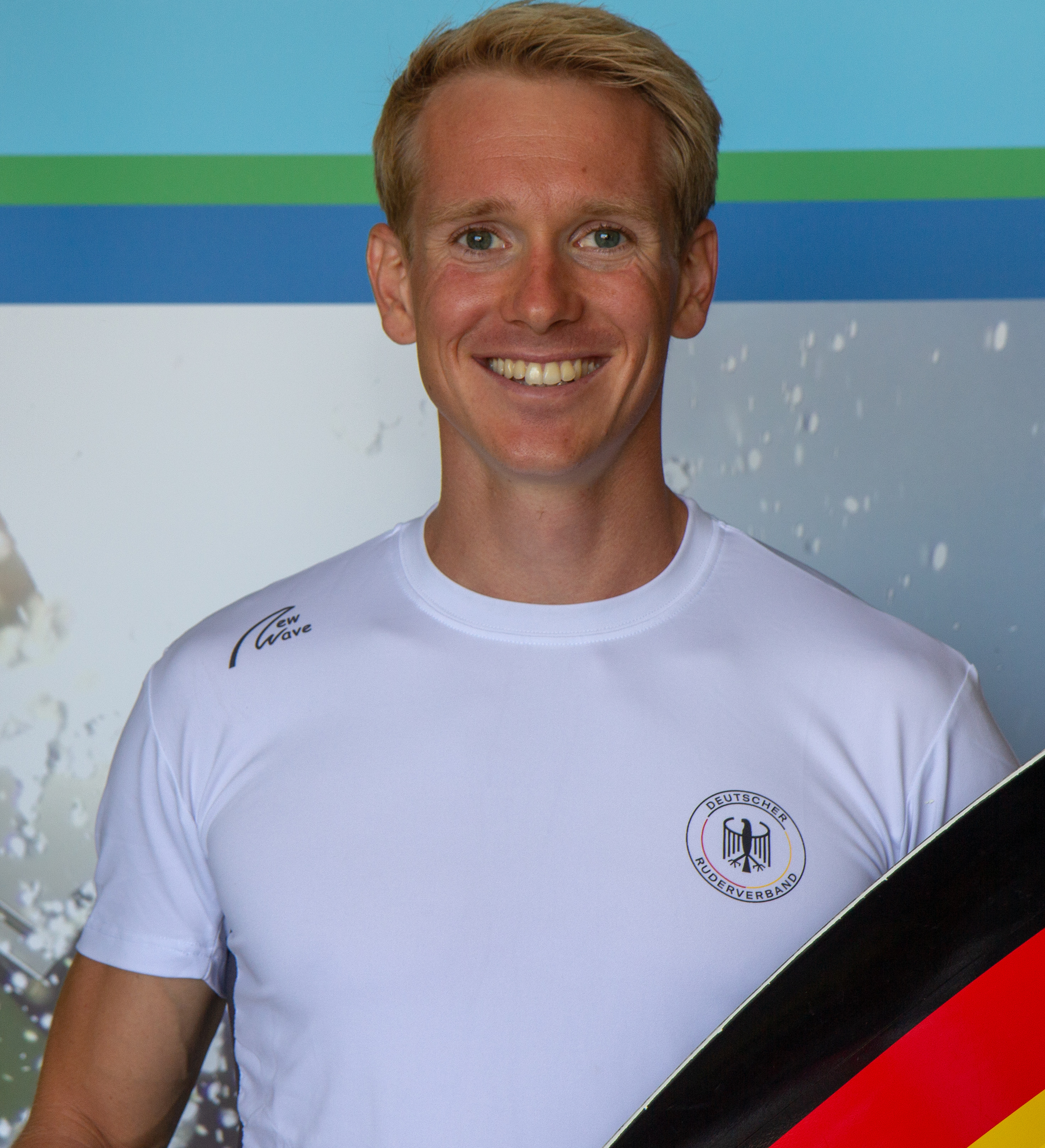 Konstantin Steinhübel beim Medientag des Deutschen Ruderverbandes in der Ruderakademie Ratzeburg am 22. August 2018.